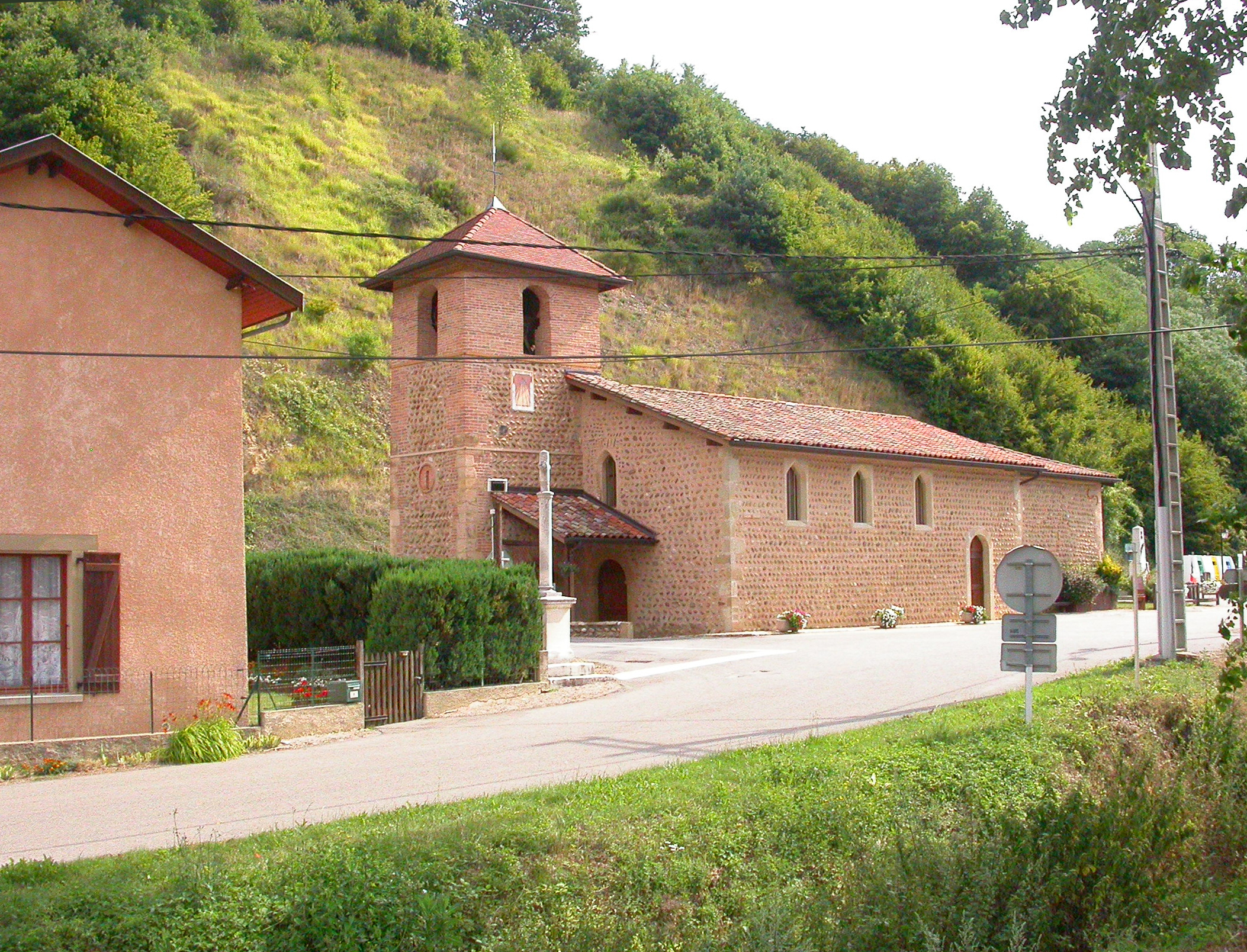 Eglise saint jacques le Majeur à Lentiol Isère France